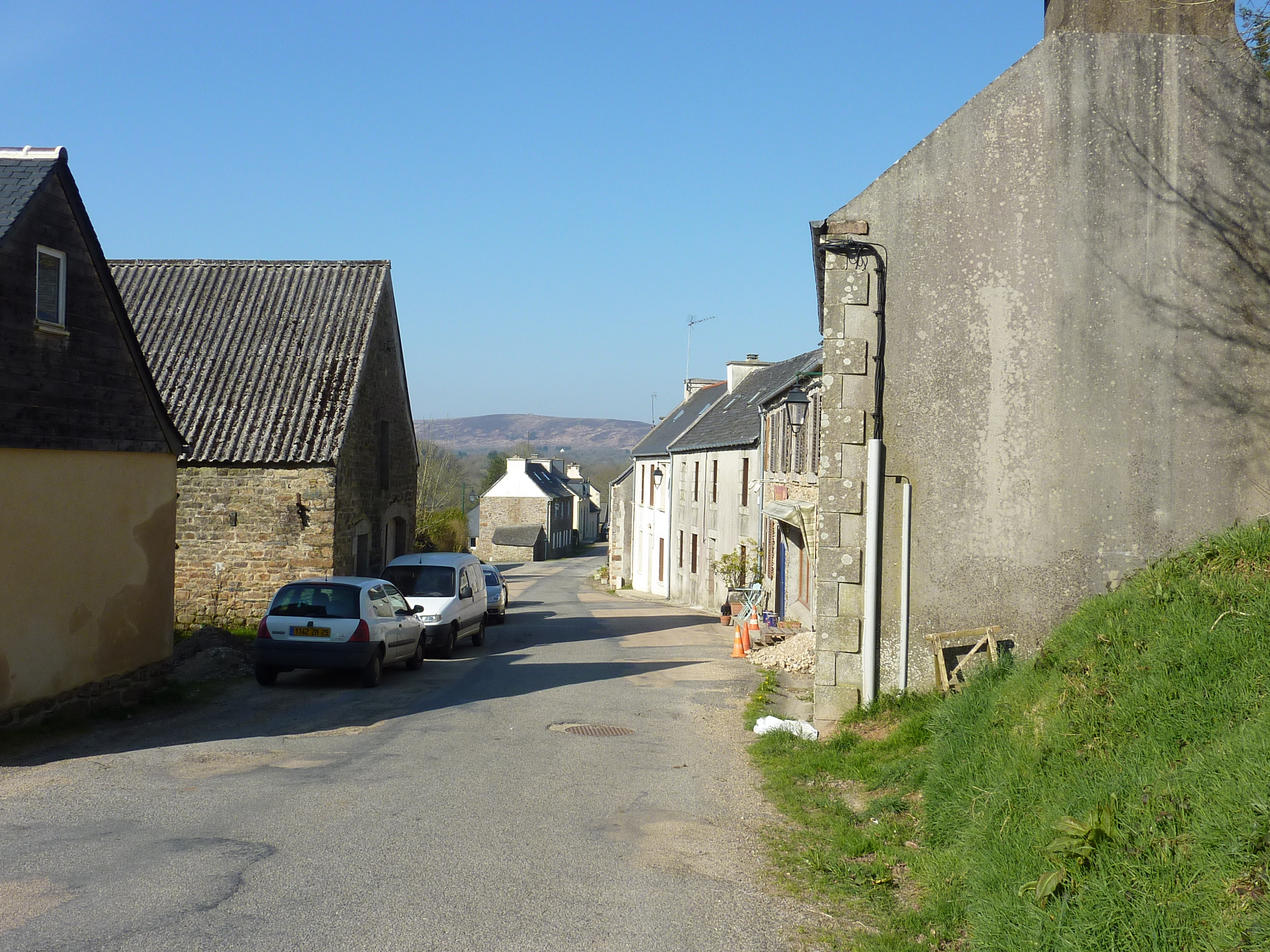 La rue principale du bourg de Botmeur